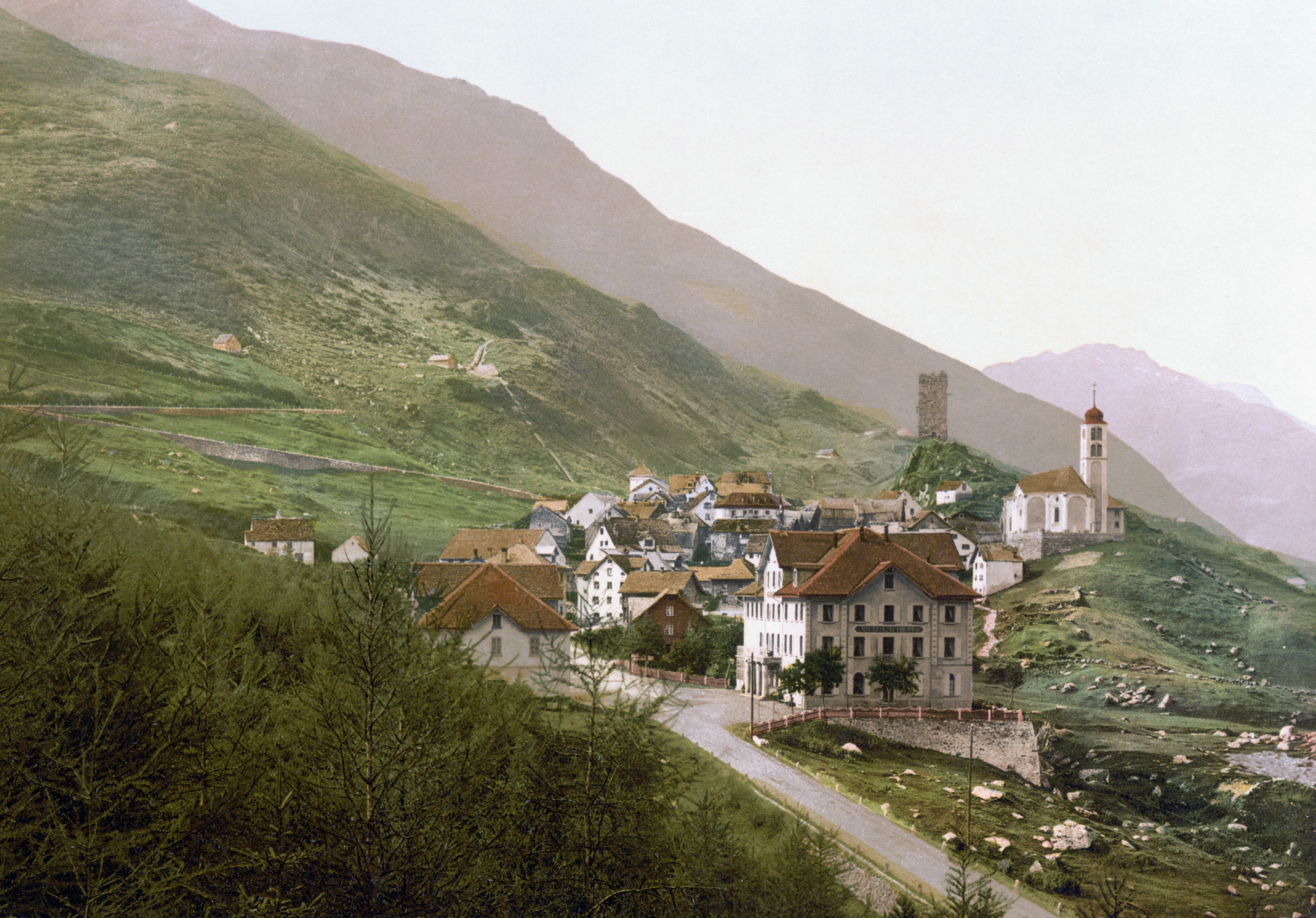 Hospental